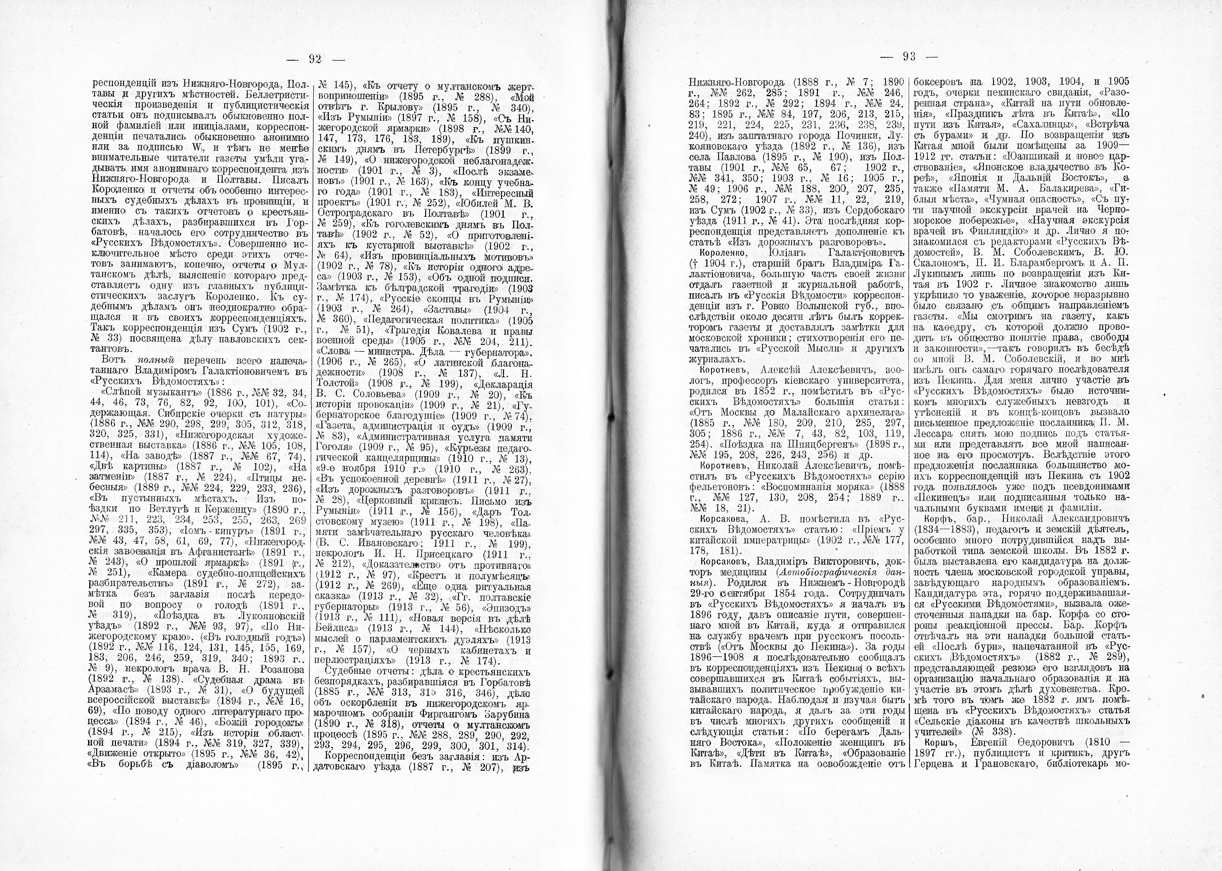 Библиография статей В. Г. Короленко в "Русских ведомостях" по состоянию на 1913 г. Юбилейный сборник "Русских ведомостей"